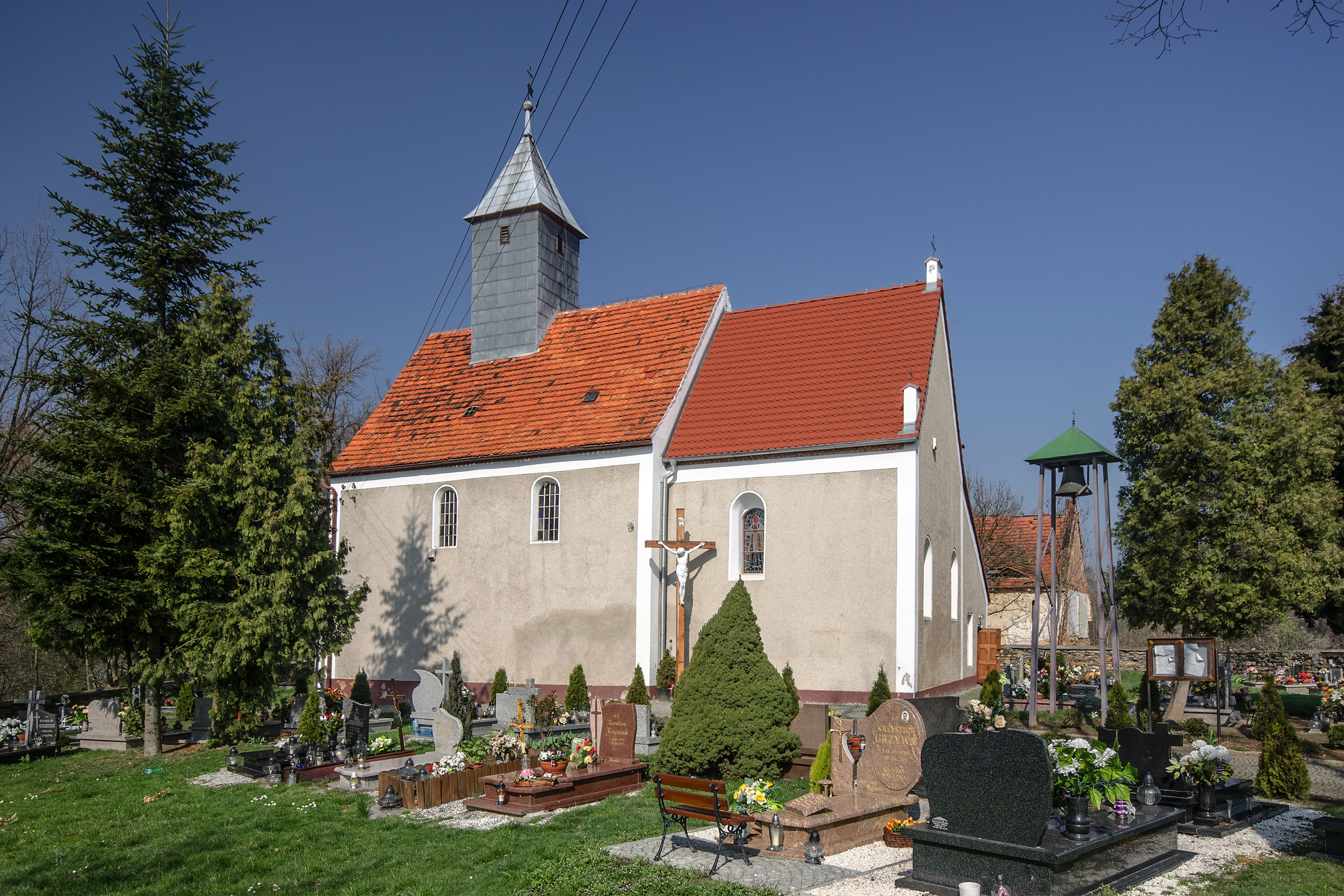 Godziszowa, kościół fil. p.w. Podwyższenia Krzyża (dec. p.w. św. Szczepana), XV/XVI, XVIII